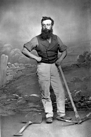 Alexander Anderson (poet)